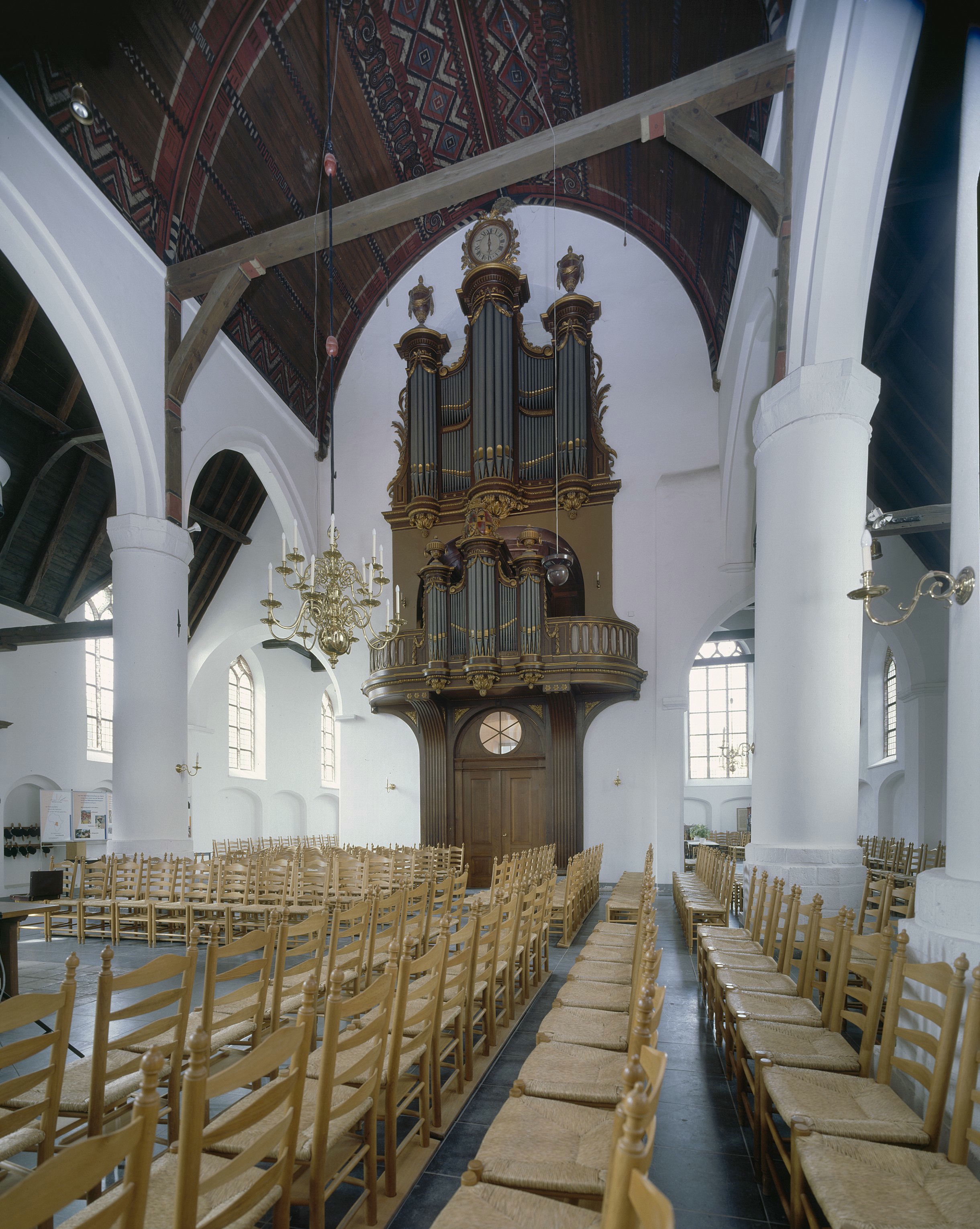 Nederlands Hervormde Kerk: Interieur, aanzicht orgel, orgelnummer 1268 (opmerking: Gefotografeerd voor Het Historische Orgel in Nederland 1769-1790)